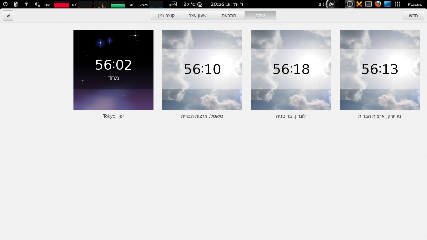 הדגמה של באג לוקליזציה